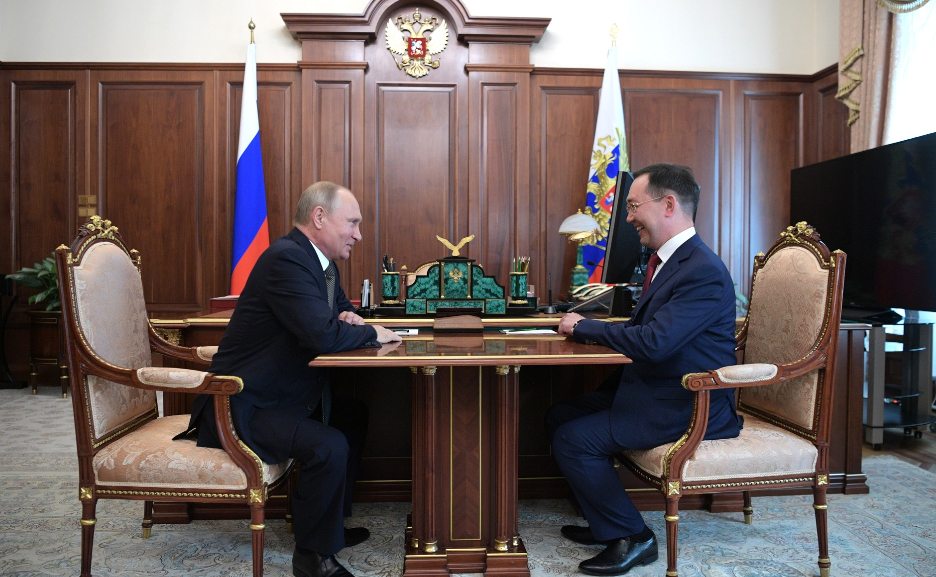 Рабочая встреча с Айсеном Николаевым. Президент подписал Указ о назначении А. Николаева временно исполняющим обязанности Главы Республики Саха (Якутия).